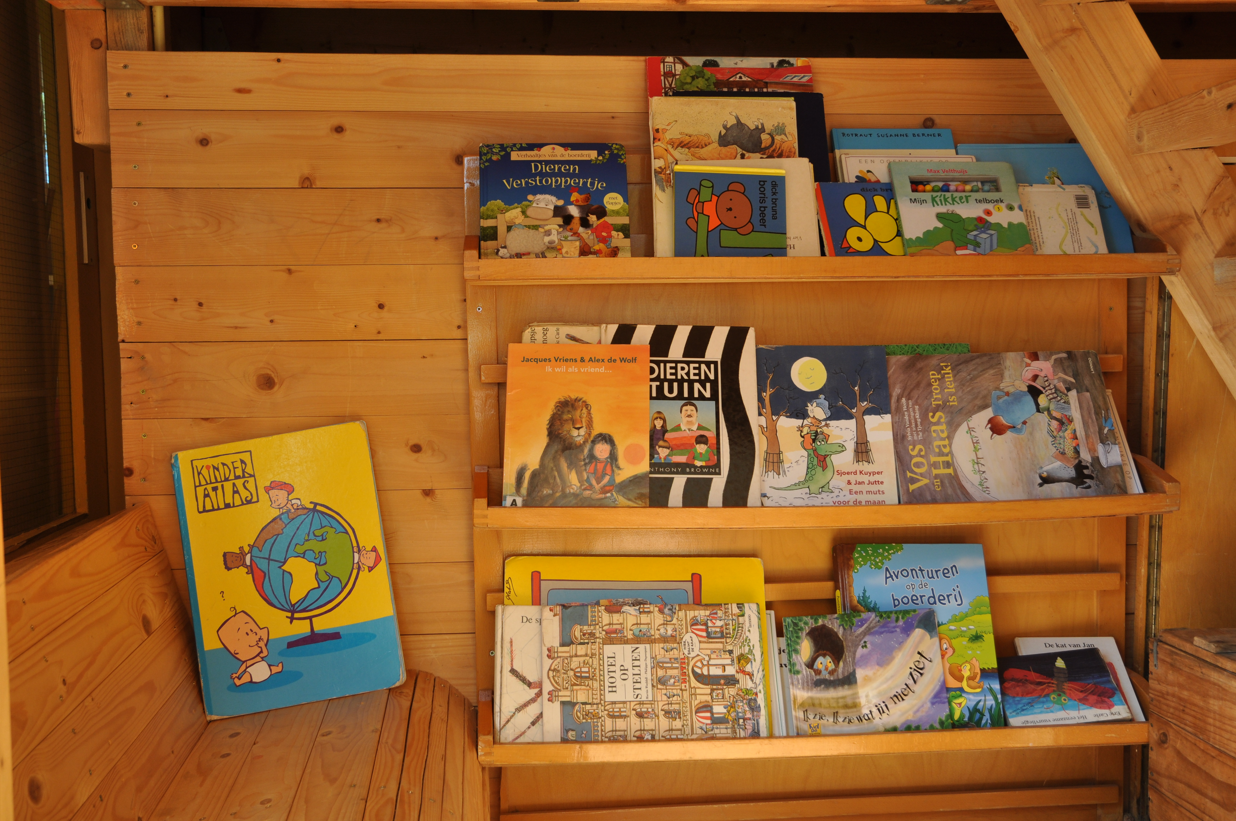 Boekenhoek in een kleuterklas op de Werkplaats Kindergemeenschap in Bilthoven.